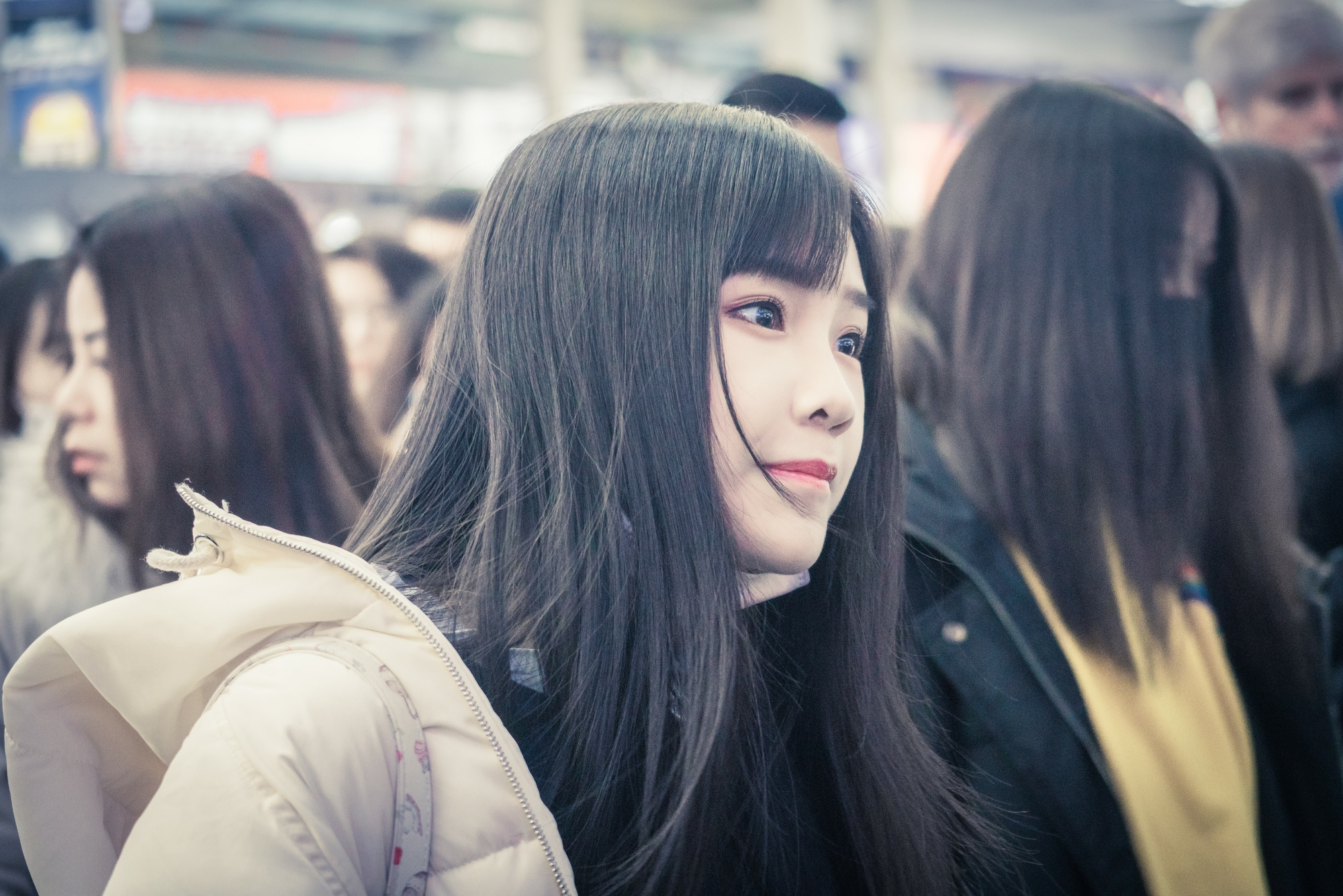 2018.2.6 虹桥火车站~ 苏杉杉